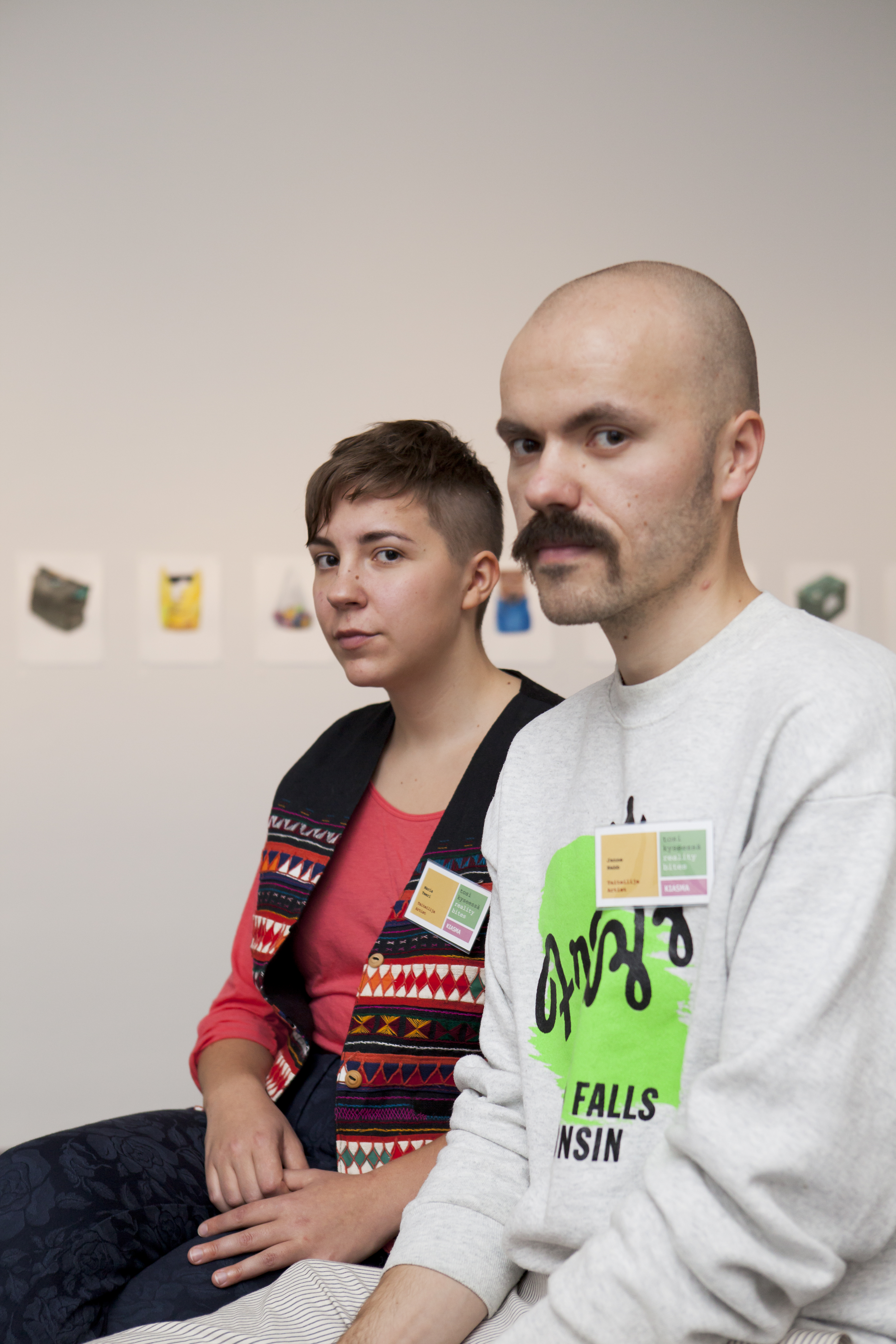 Kiasma; näyttely; TOSI KYSEESSÄ, dokumentti nykytaiteessa REALITY BITES, Document in Contemporary Art 2.11.2012-10.3.2013 henkilökuva; kuvassa taiteilijat Janne Nabb 1984 Suomi / Finland & Maria Teeri 1985 Suomi / Finlandkuva / Photo: Valtion taidemuseo / Kuvataiteen keskusarkisto / Pirje Mykkänen Finnish National Gallery / Central Art Archives / Pirje Mykkänen